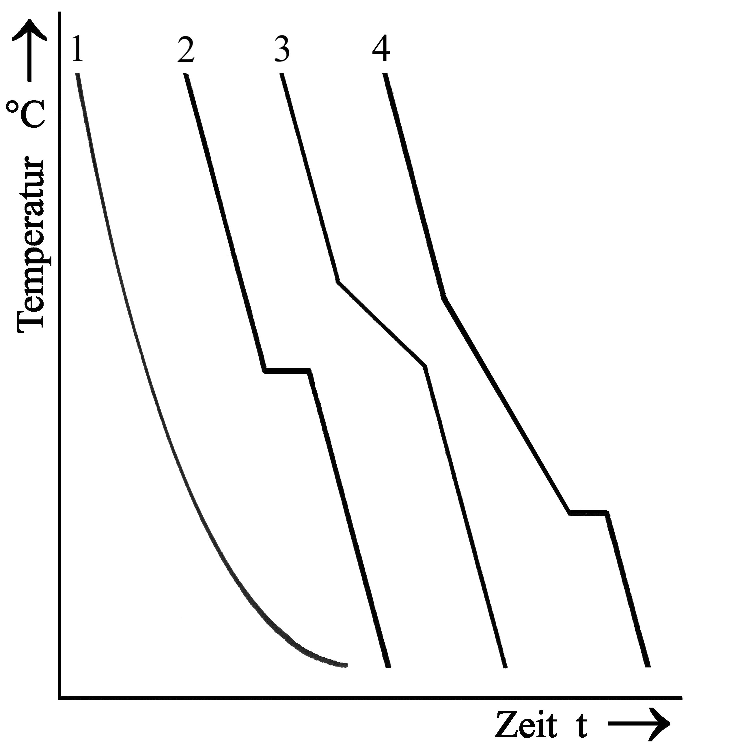 Bildbeschreibung: Thermische Analyse, Abkühlkurven Fotograf/Zeichner: Benutzer:Ra'ike Datum: 22.09.2005 andere Versionen: 1.0